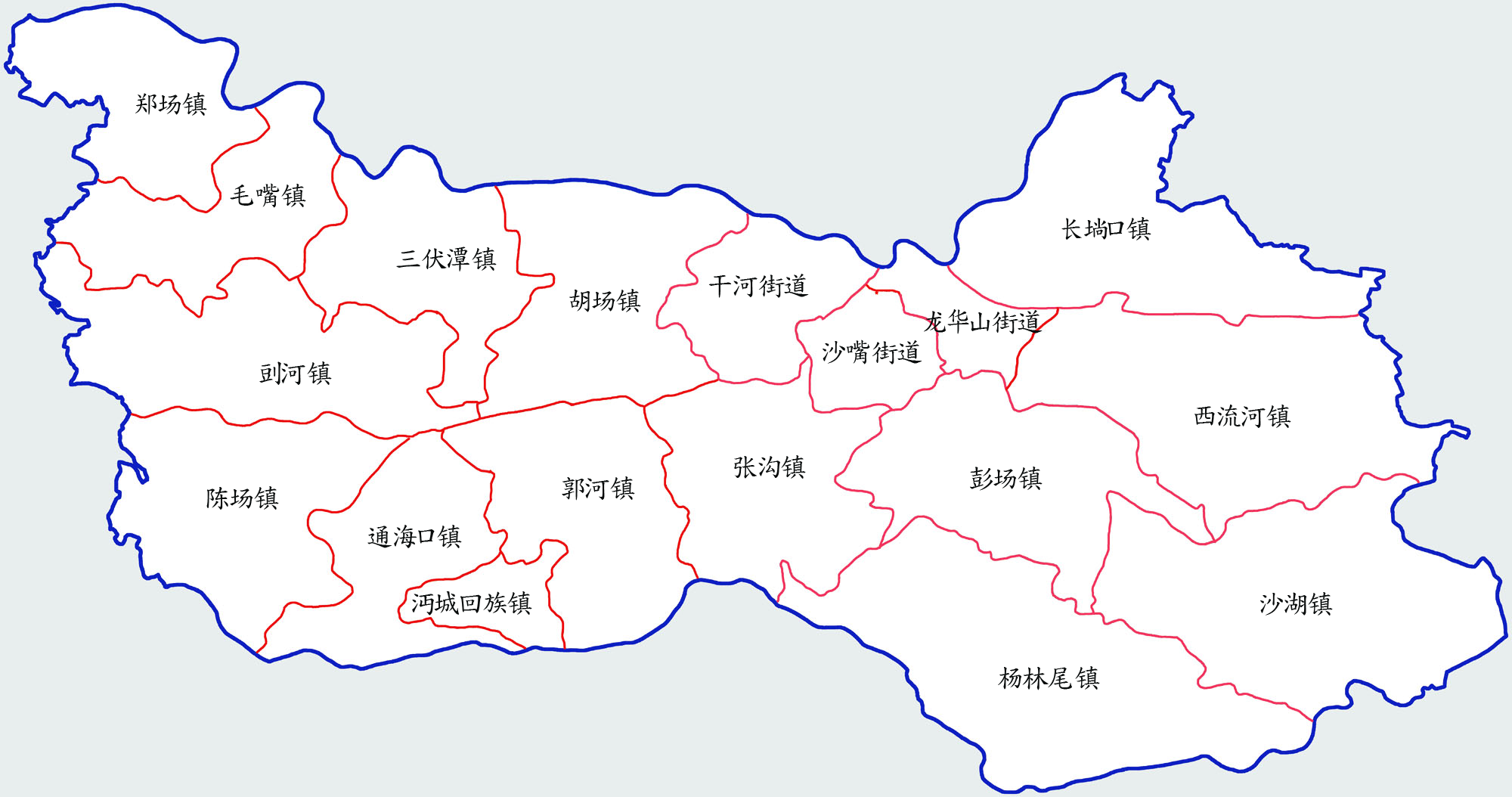 센타오시 행정구역